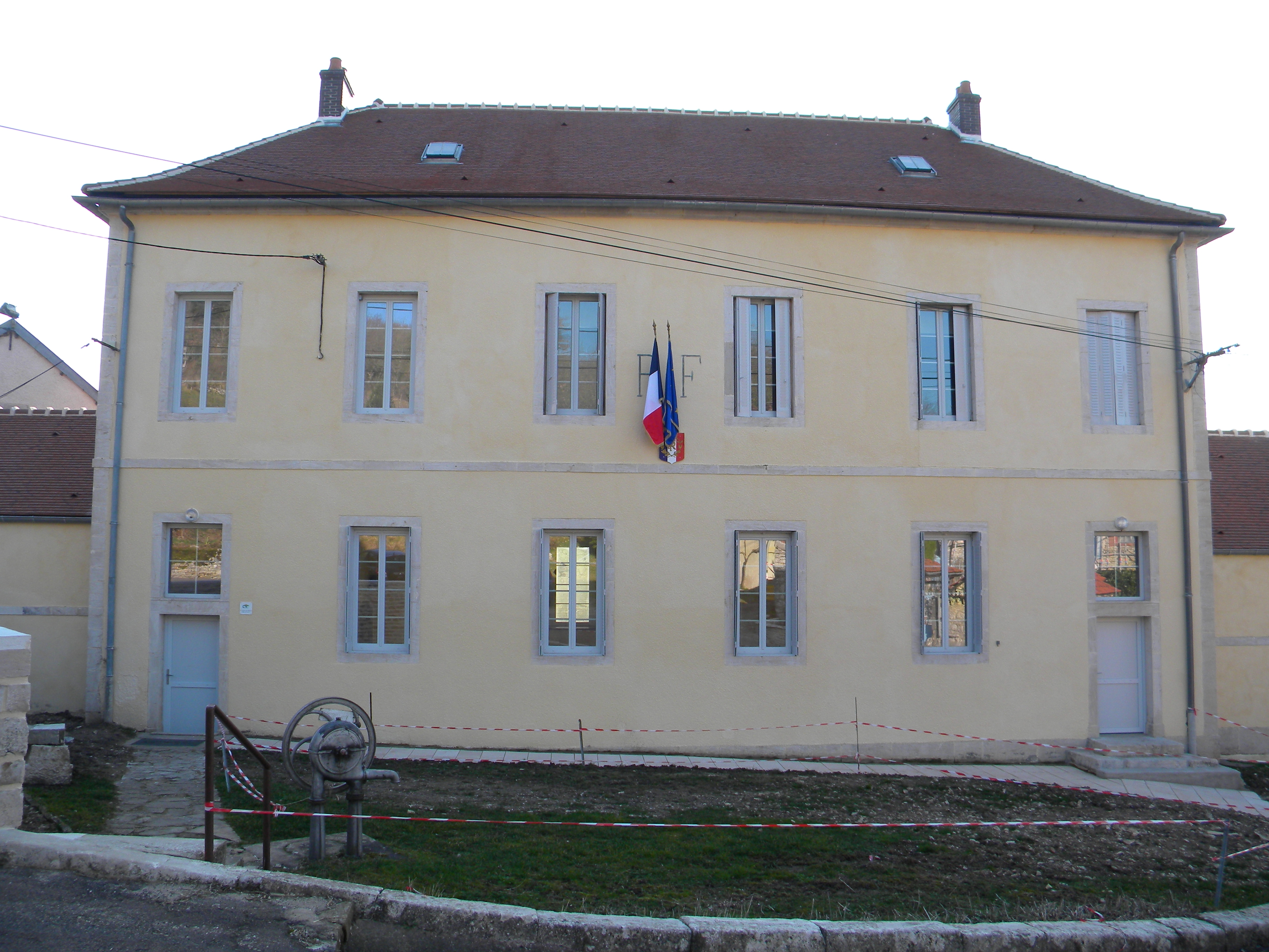 Urbodomo de Saint-Jean-de-Bœuf